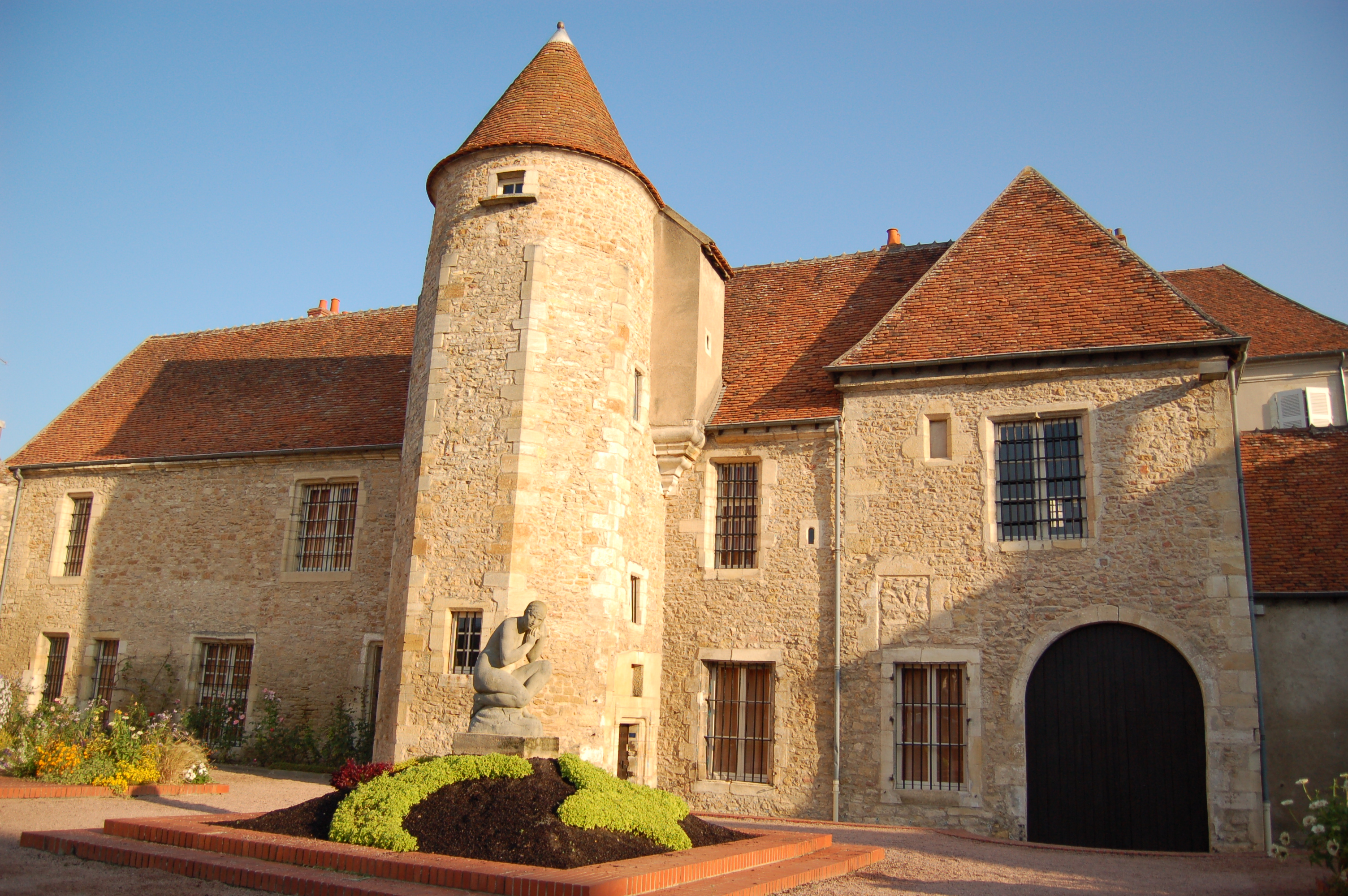 Musée Saint-Vic à Saint-Amand-Montrond, Cher, France